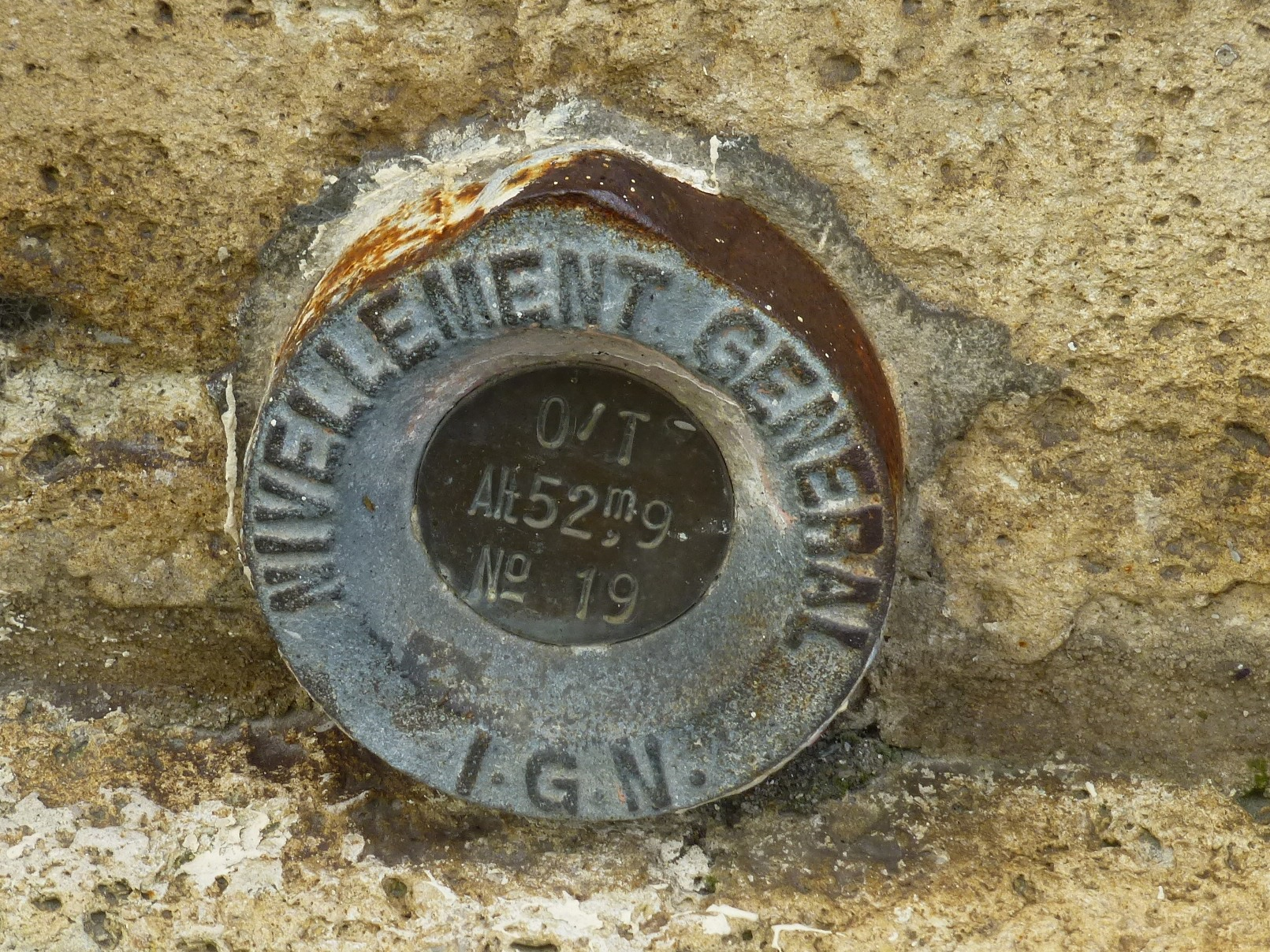 Gare de Gazinet-Cestas : borne de nivellement IGN avec altitude.